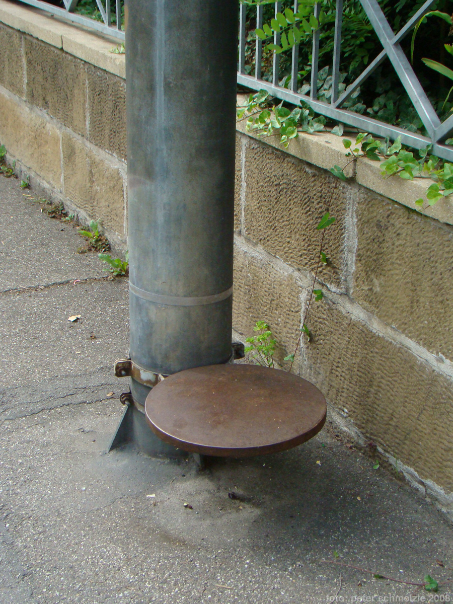 Intervention P (1994) von Christian Hasucha an einem Verkehrsschild an der Weinsberger Straße in Heilbronn